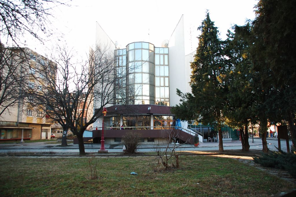 Dom kulture u Varvarinu